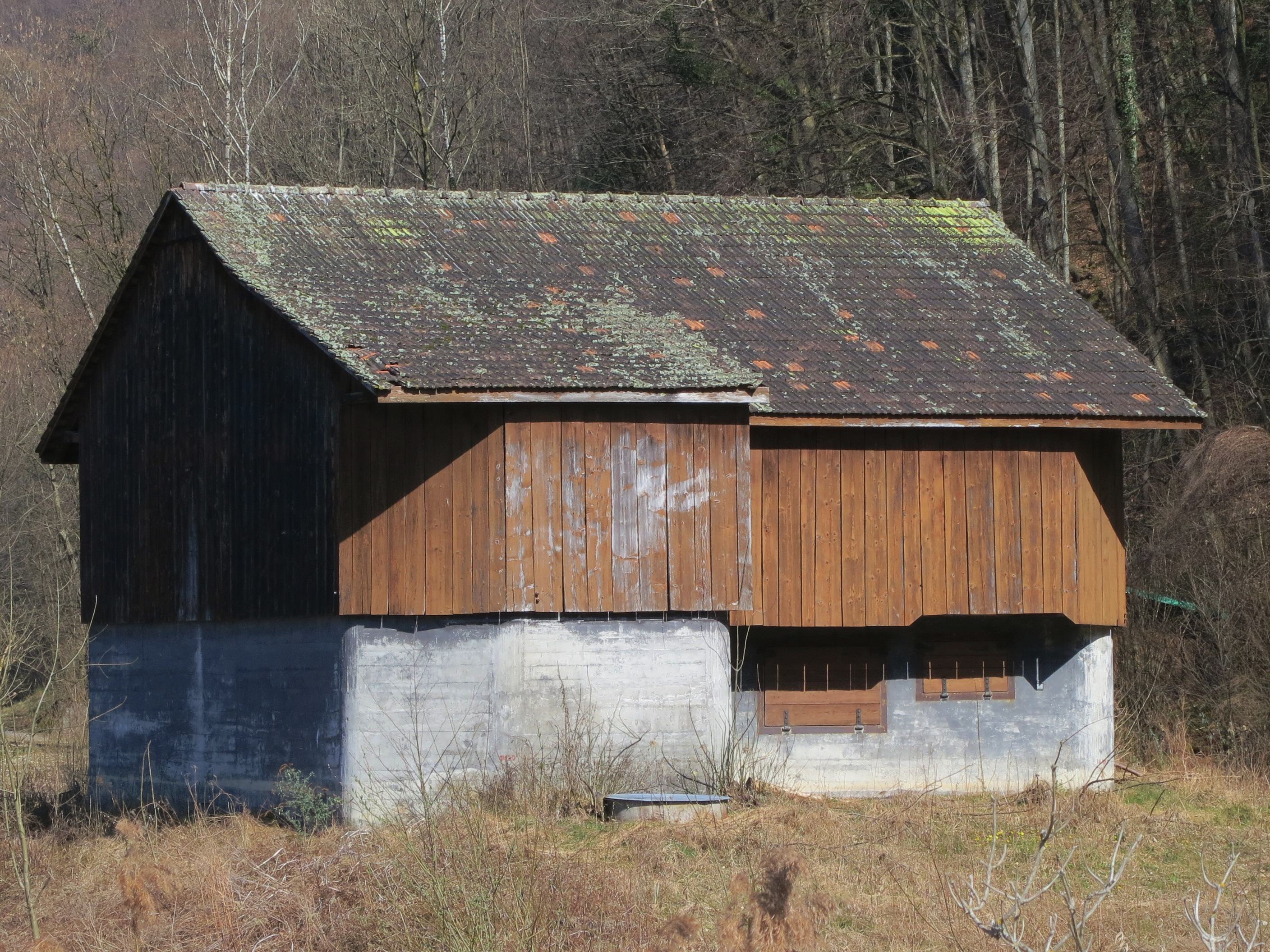 Escherkanal Bunker, Kundertried: Infanteriebunker Sitenhölzli A 6761